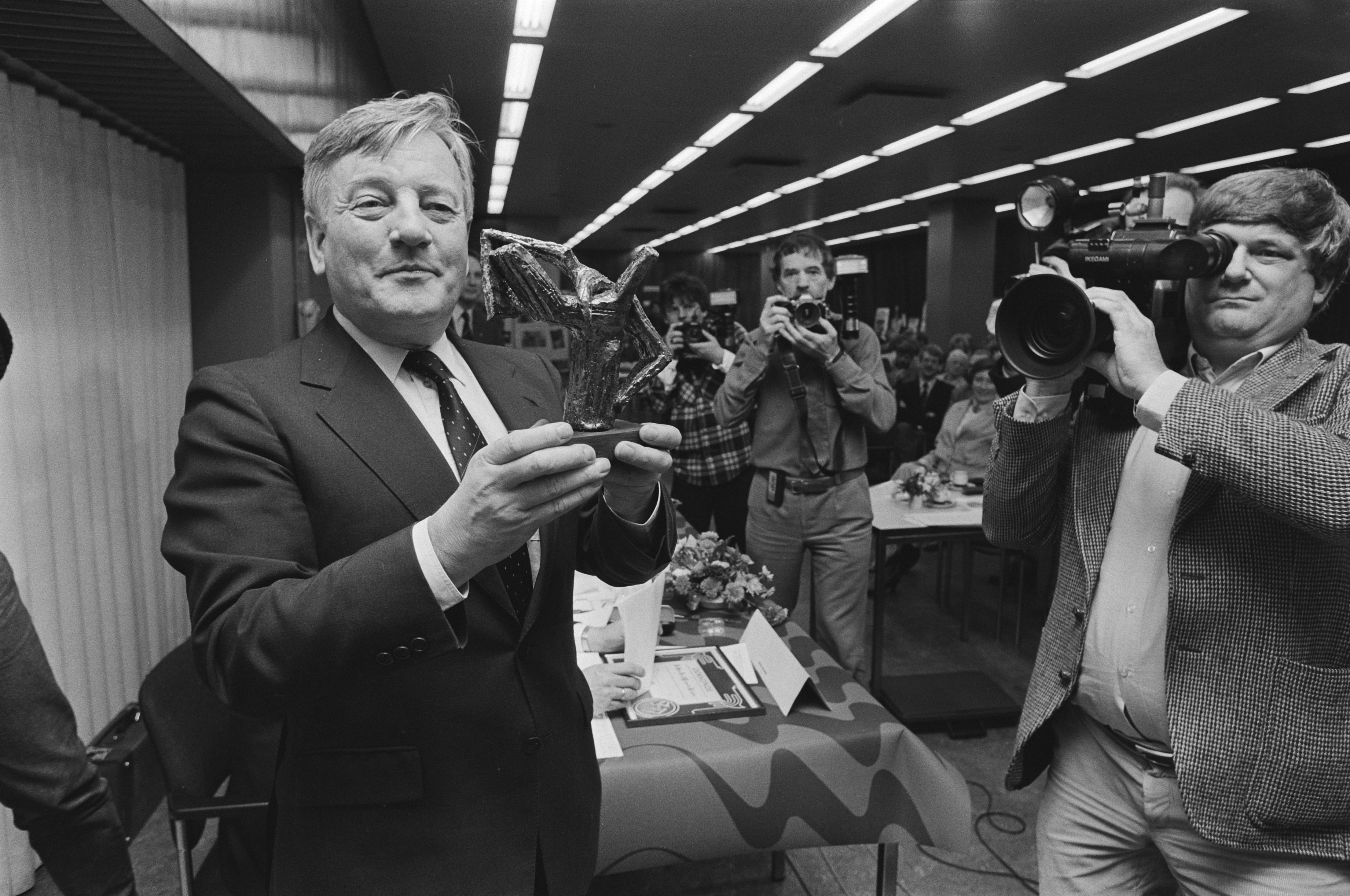 Collectie / Archief : Fotocollectie Anefo Reportage / Serie : [ onbekend ] Beschrijving : Staatssecretaris Van der Reijden (WVC) benoemd tot "dierenbeschermer van t jaar" door de Ned. Vereniging tot bescherming van dieren Datum : 1 december 1984 Trefwoorden : onderscheidingen, staatssecretarissen Persoonsnaam : Reijden, Joop van der Fotograaf : Bogaerts, Rob / Anefo Auteursrechthebbende : Nationaal Archief Materiaalsoort : Negatief (zwart/wit) Nummer archiefinventaris : bekijk toegang 2.24.01.05 Bestanddeelnummer : 933-1672